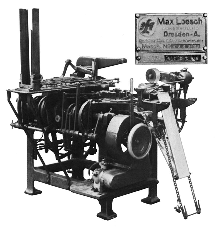 Historische Maschine der Max Loesch Maschinenfabrik Dresden (heute LoeschPack)